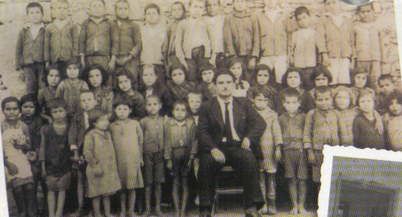 Οι μαθητές του Δημοτικού Σχολείου Πασαλιτών με δάσκαλο τον Νικήστρατο Αλυσανδράκη. Έτος 1938